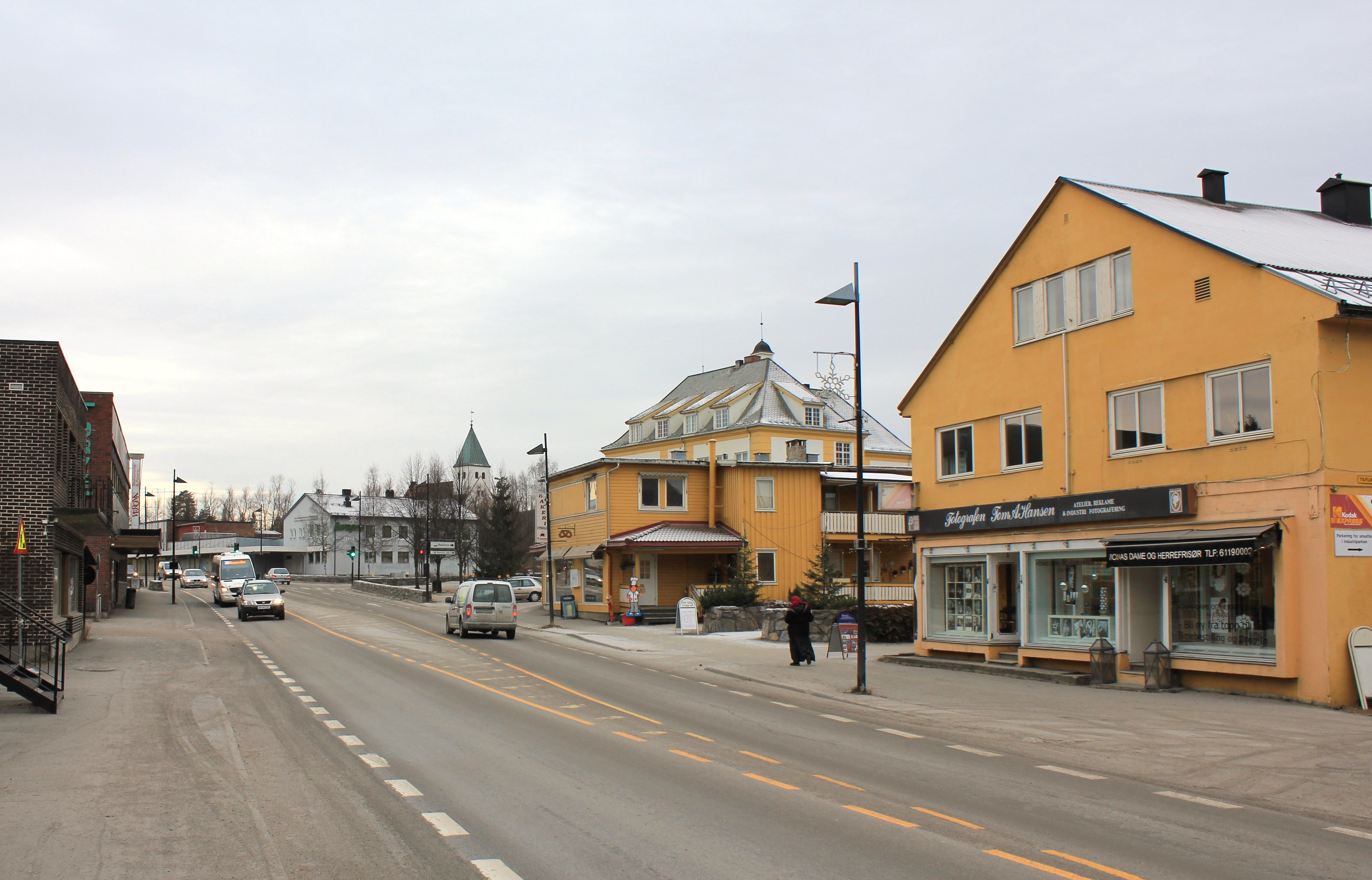 Raufoss sentrum.